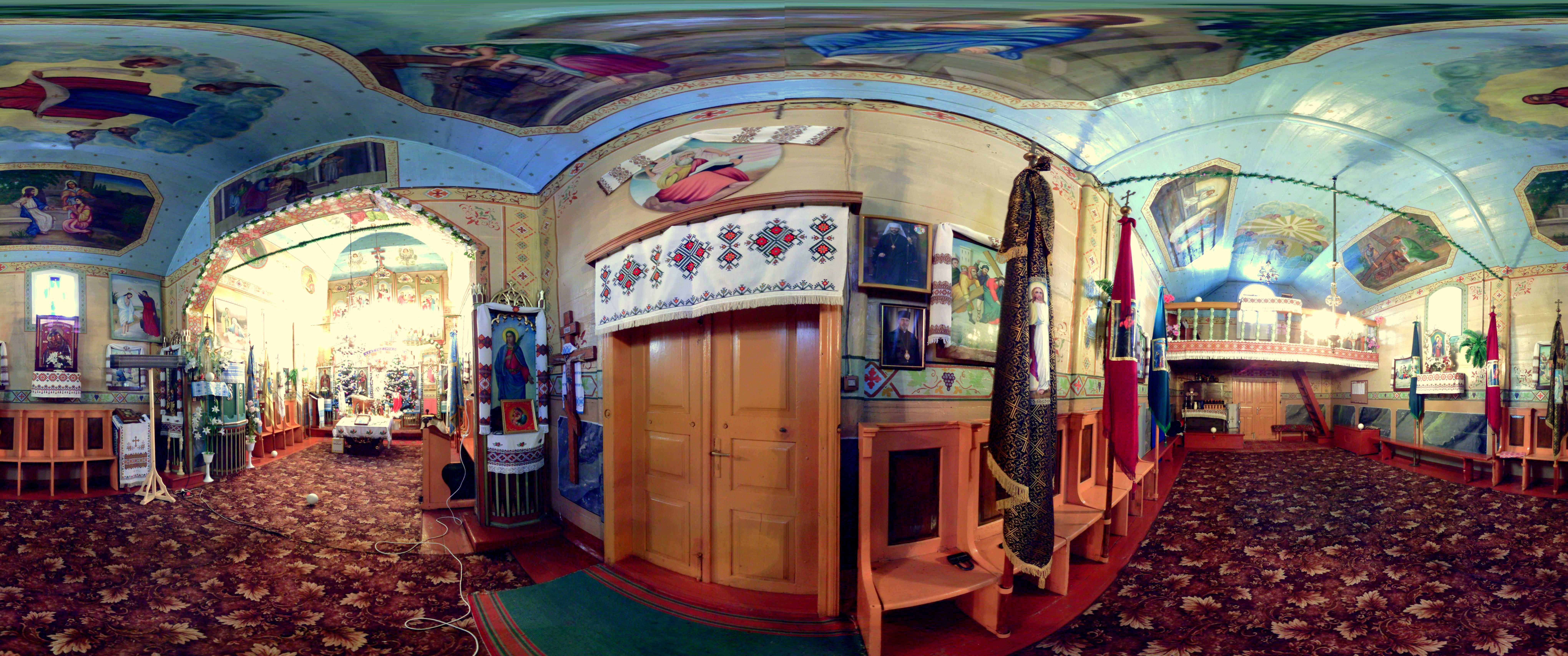 Церква Св. Євстахія (дер.), с. Облазниця